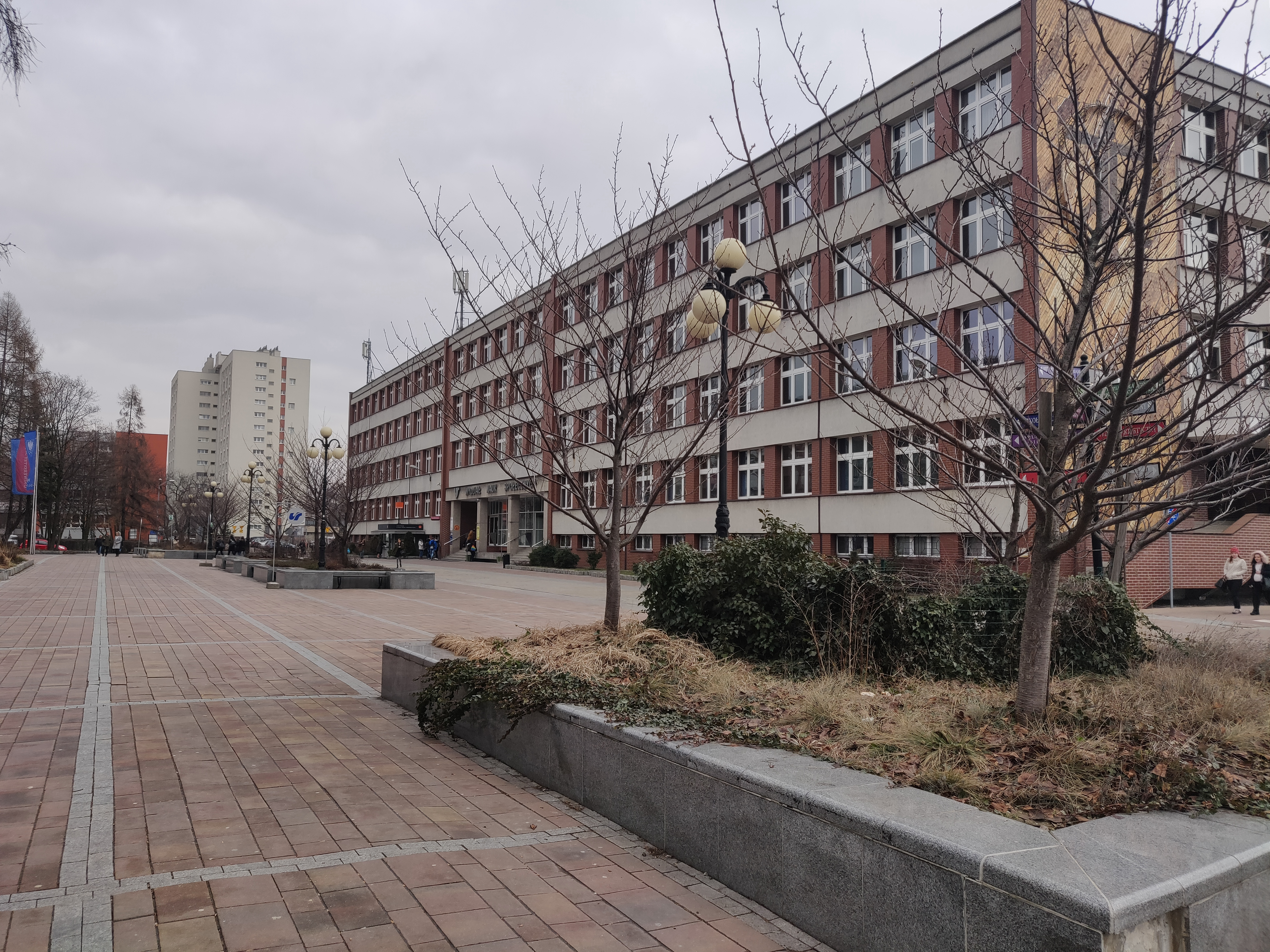 Gmach Wydziału Nauk Społecznych Uniwersytetu Śląskiego w Katowicach przy ul. Bankowej 11